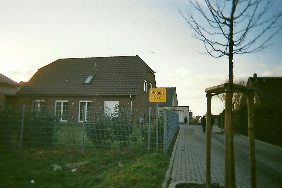 "Pescher Kamp", innerhalb von Neu-Immerath, dient als Umsiedlungsort für die Einwohner von Pesch die schon vorzeitig umsiedelten.